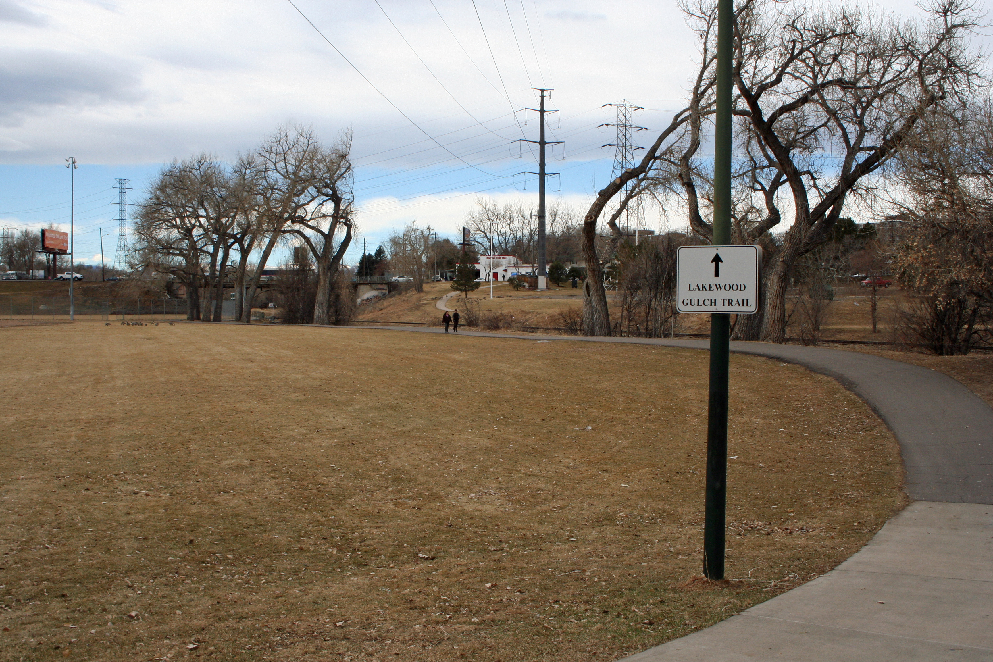 Lakewood Gulch in Denver, Colorado.